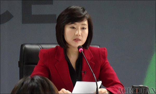 일본군위안부 한국만화기획전 개최 기자간담회